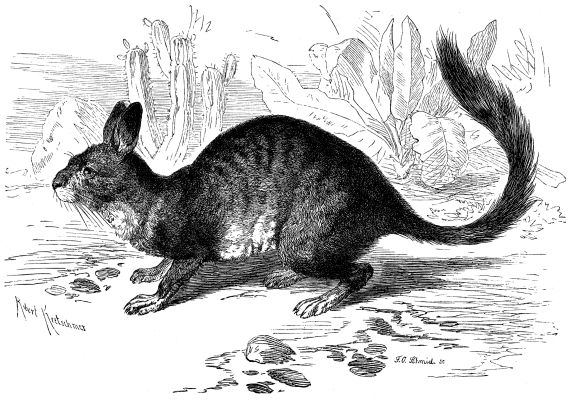 Lagidium viscacia / Lagidium cuvieri [1]